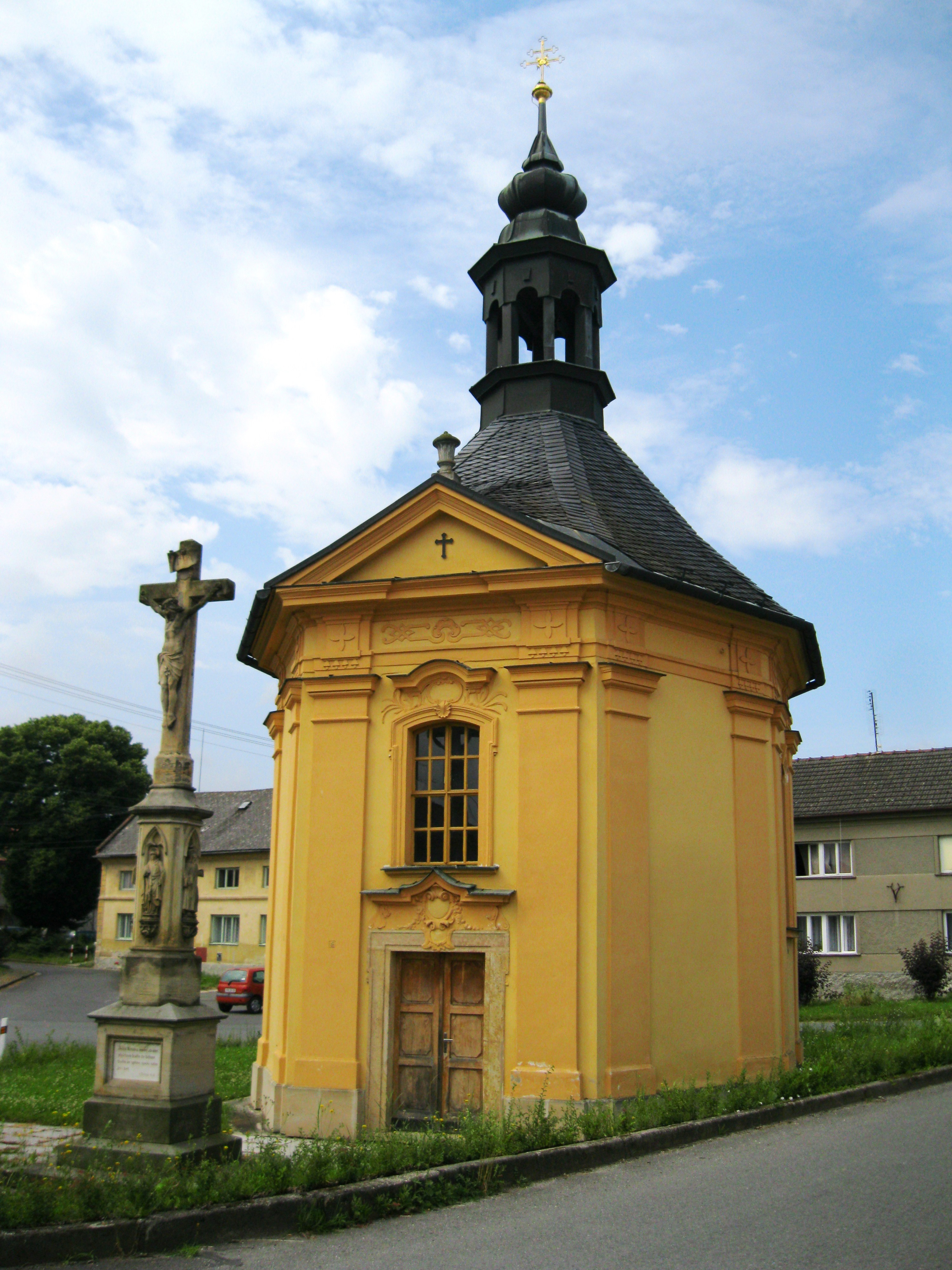 Kaple sv. Anny (Kožušany), náves, Kožušany